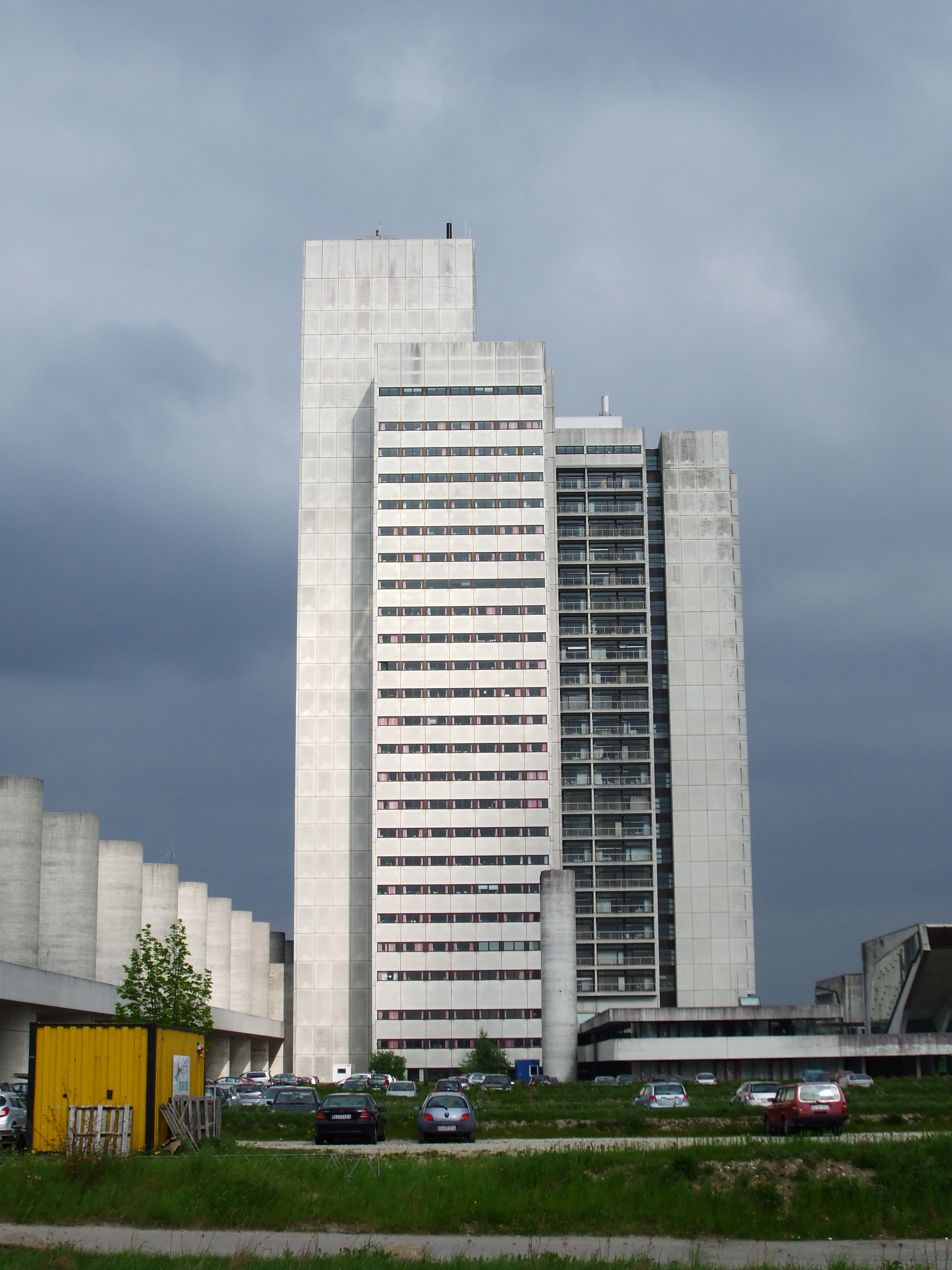 Danmarks højeste bygning set fra vest.